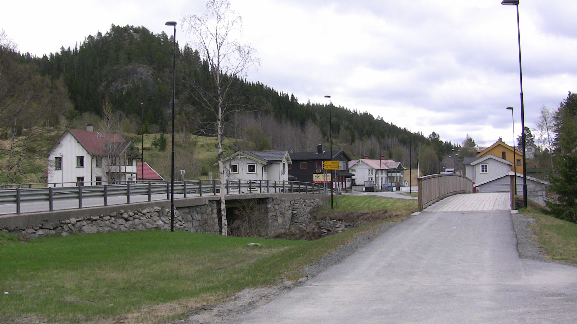 Høydalsmo